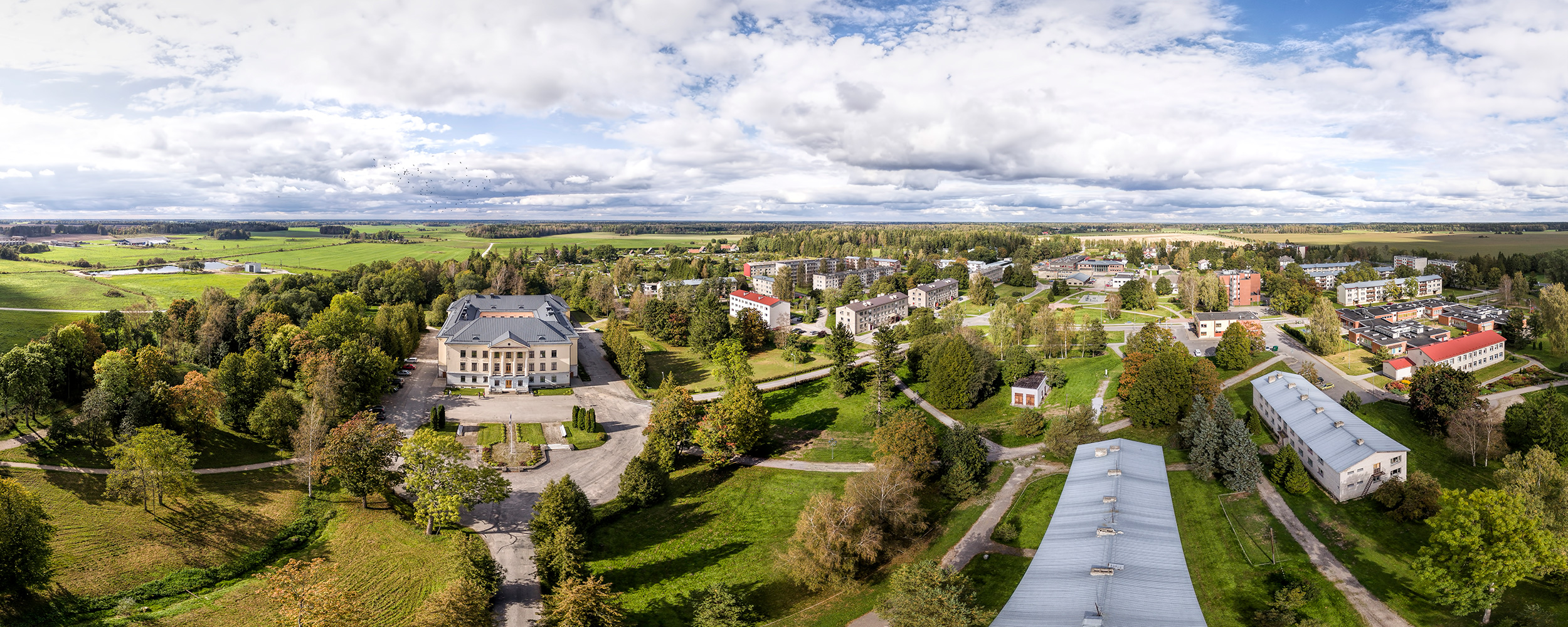 Vaade Kehtna Kutsehariduskeskusele